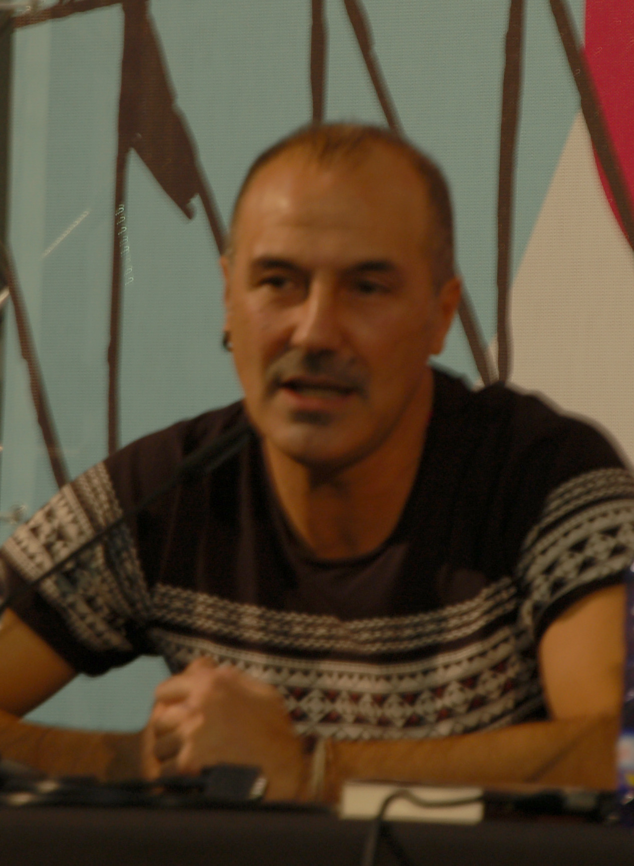 Antón Lopo no Culturgal 2010